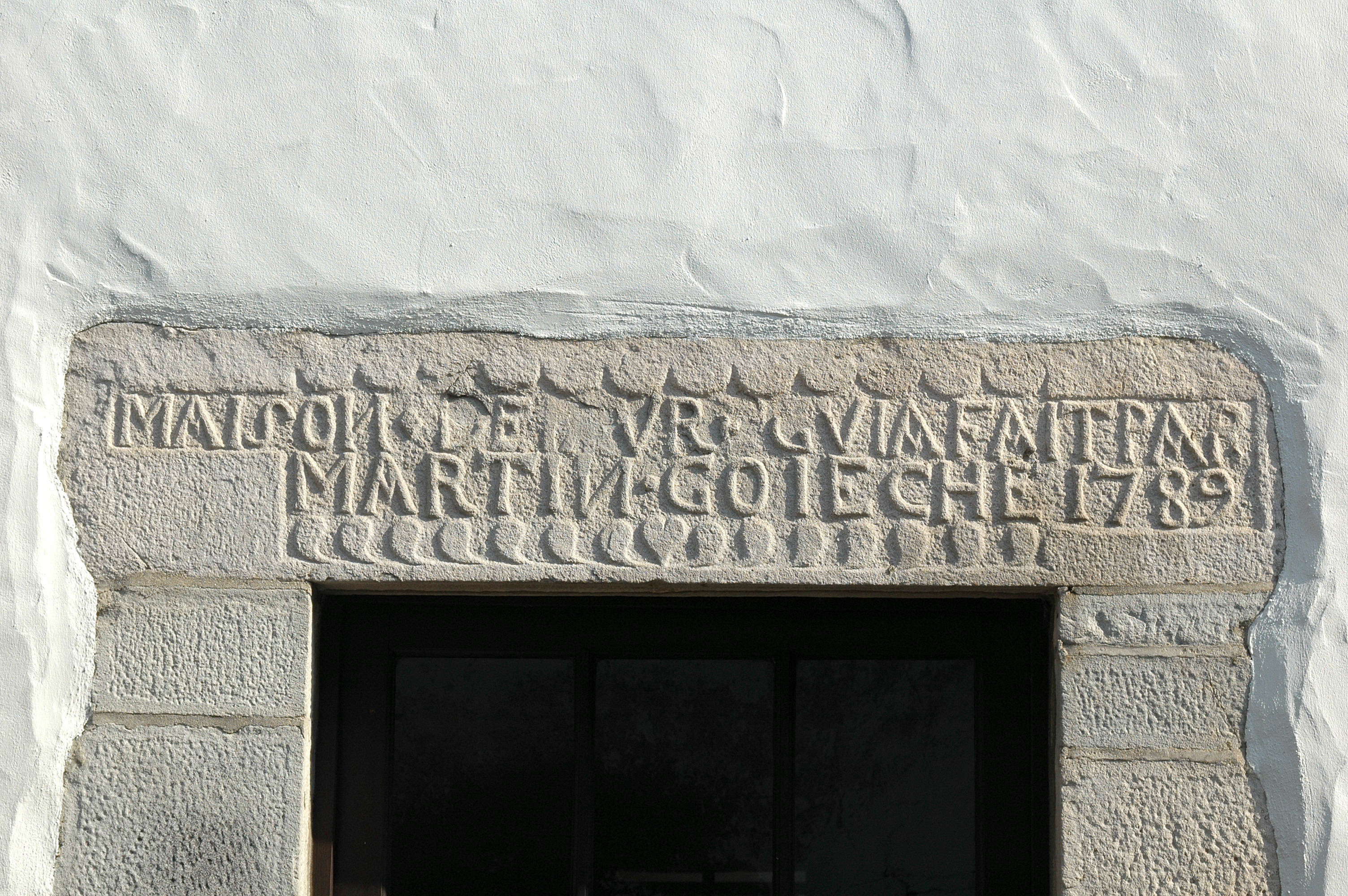 Ascain, détail du linteau d'une maison. Photo prise le 23/07/06 par Harrieta171